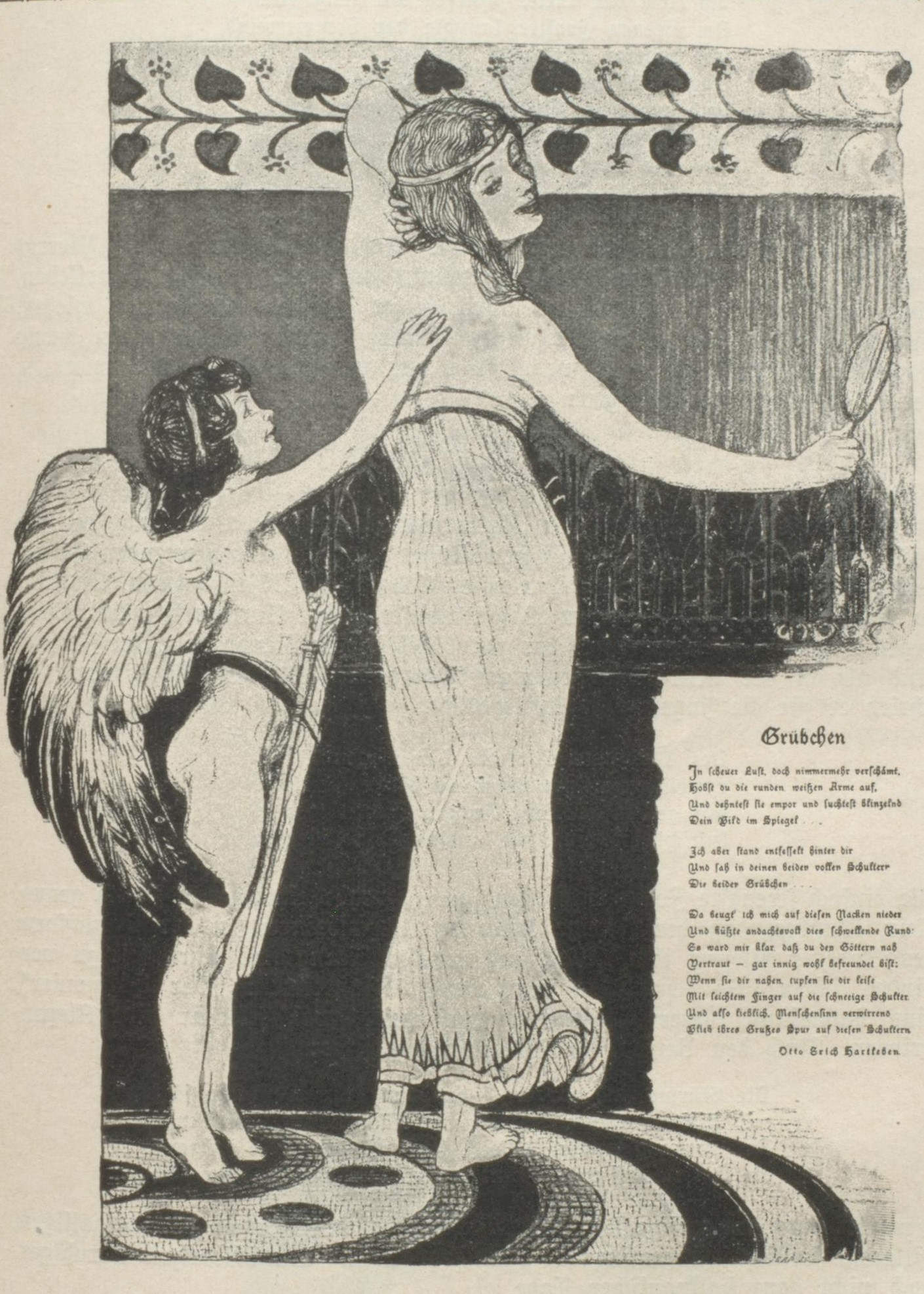 Angelo Jank Illustration zu Otto Erich Hartleben Grübchen in Simplicissimus 1896, Heft 2